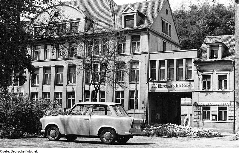 Original image description from the Deutsche FotothekMeißen. Ehem. 1. Meißner Mühle, später Quaas, dann VEB Bienenwirtschaft Meißen